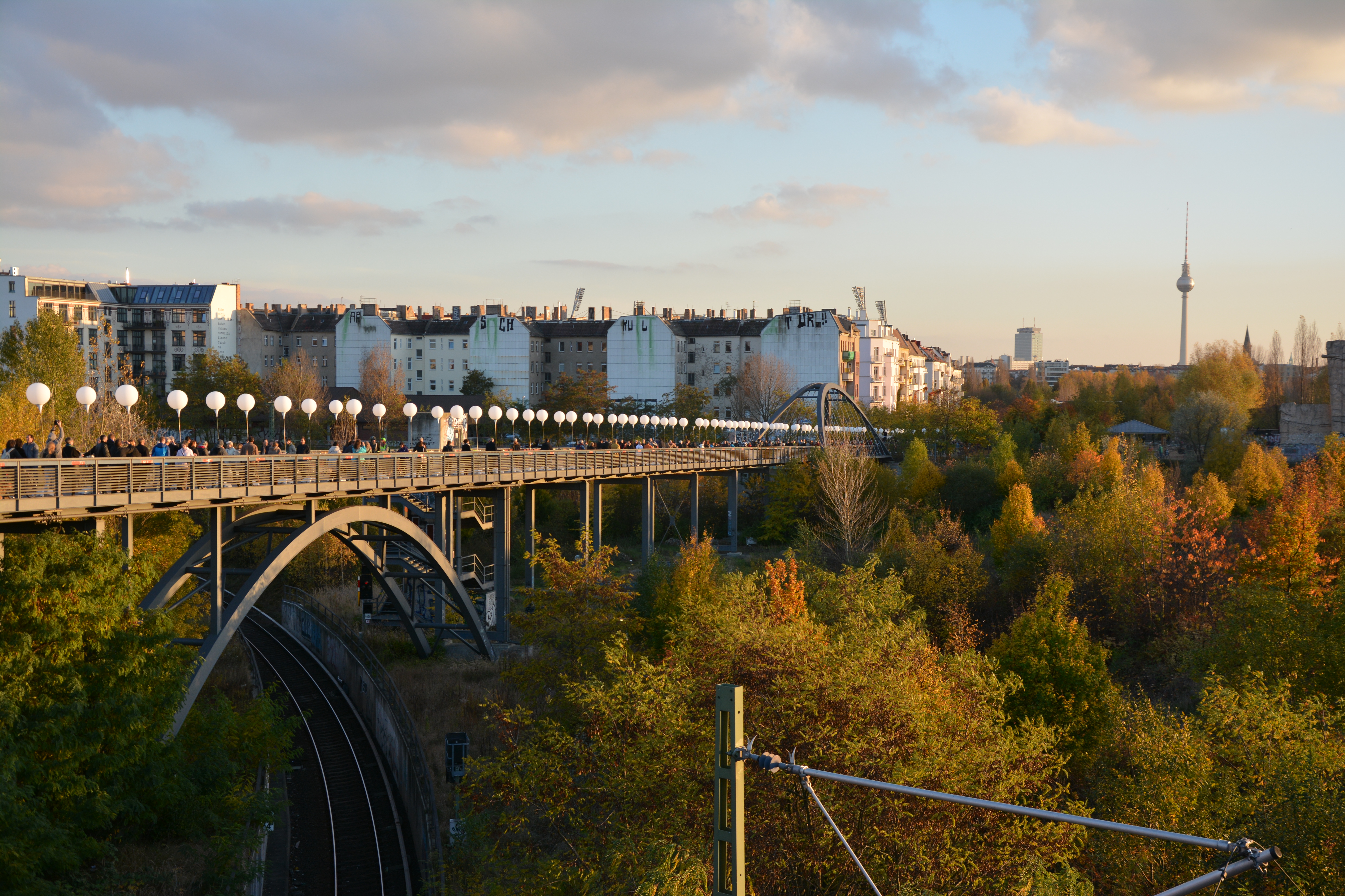 Lichtgrenze: Lichtinstallation mit rund 7000 weißen, leuchtenden Ballons zum Gedenken an den 25. Jahrestag des Falls der Berliner Mauer im vom 7. bis 9. November 2014